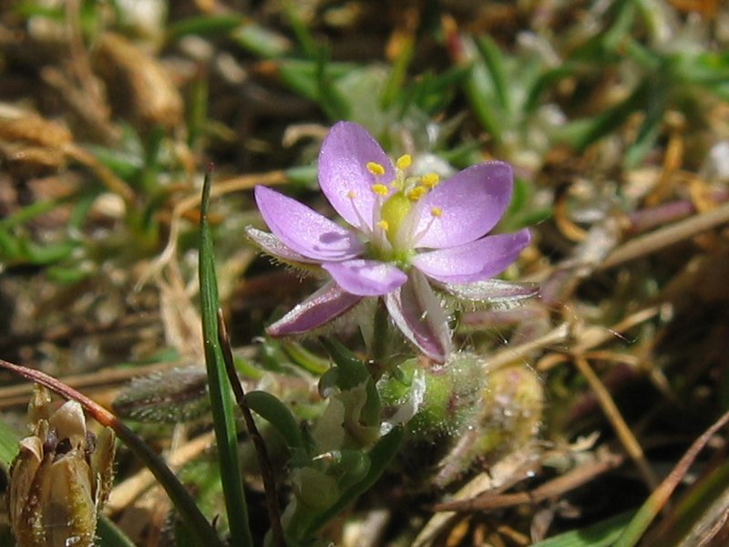 Rote Schuppenmiere Spergularia rubra, Östlich Zingst